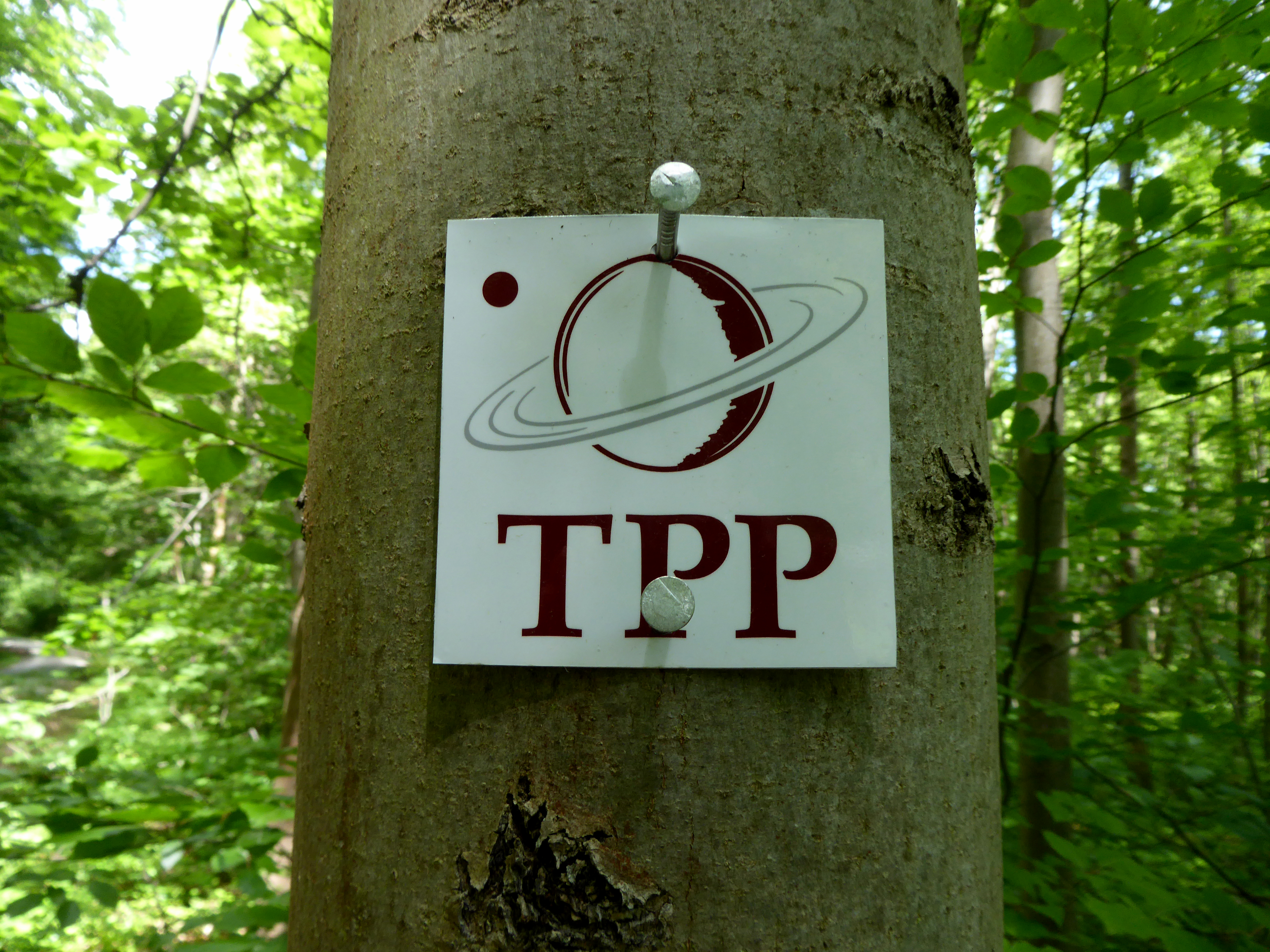 Logo / Wanderwegmarkierung des Tautenburger Planetenpfades in 07778 Tautenburg / Thüringen